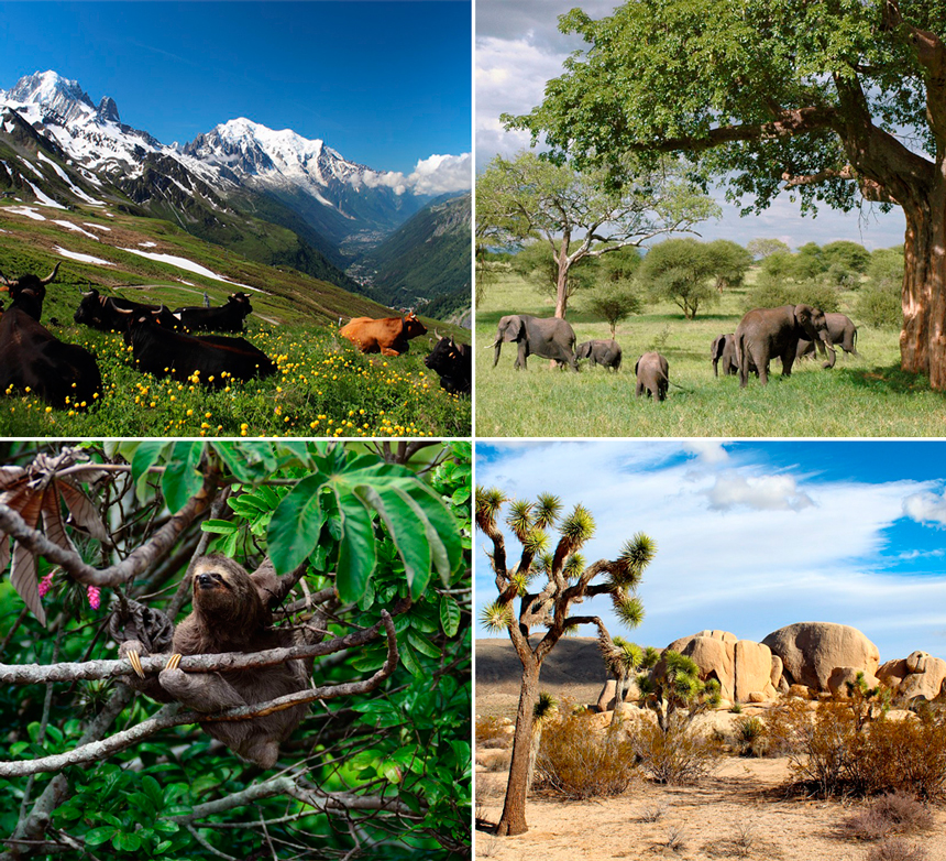 ecosistema